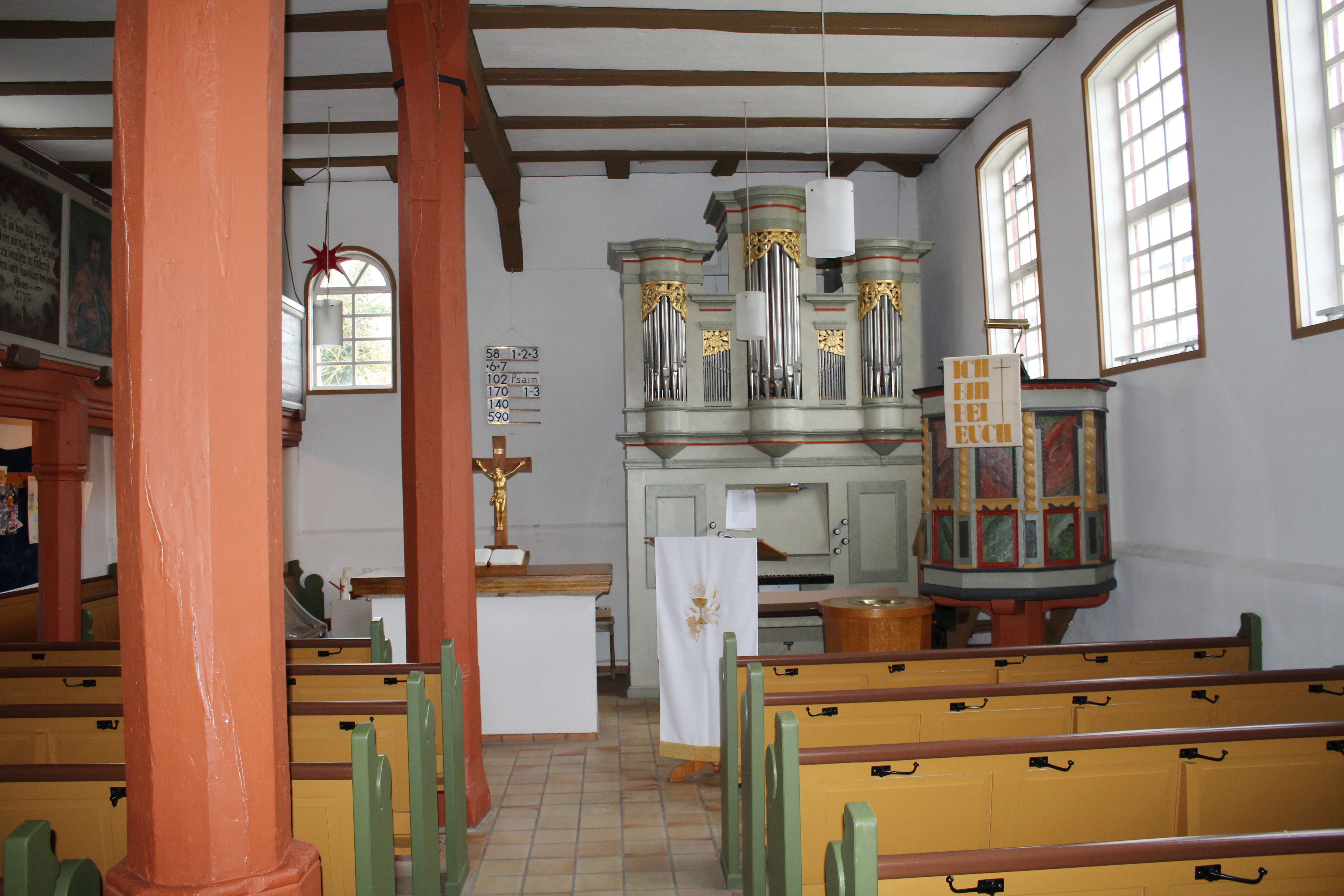 Evangelische Kirche Ilsdorf (ursprünglich Bernsfeld), Gemeinde Mücke, Vogelsbergkreis, Hessen, Deutschland